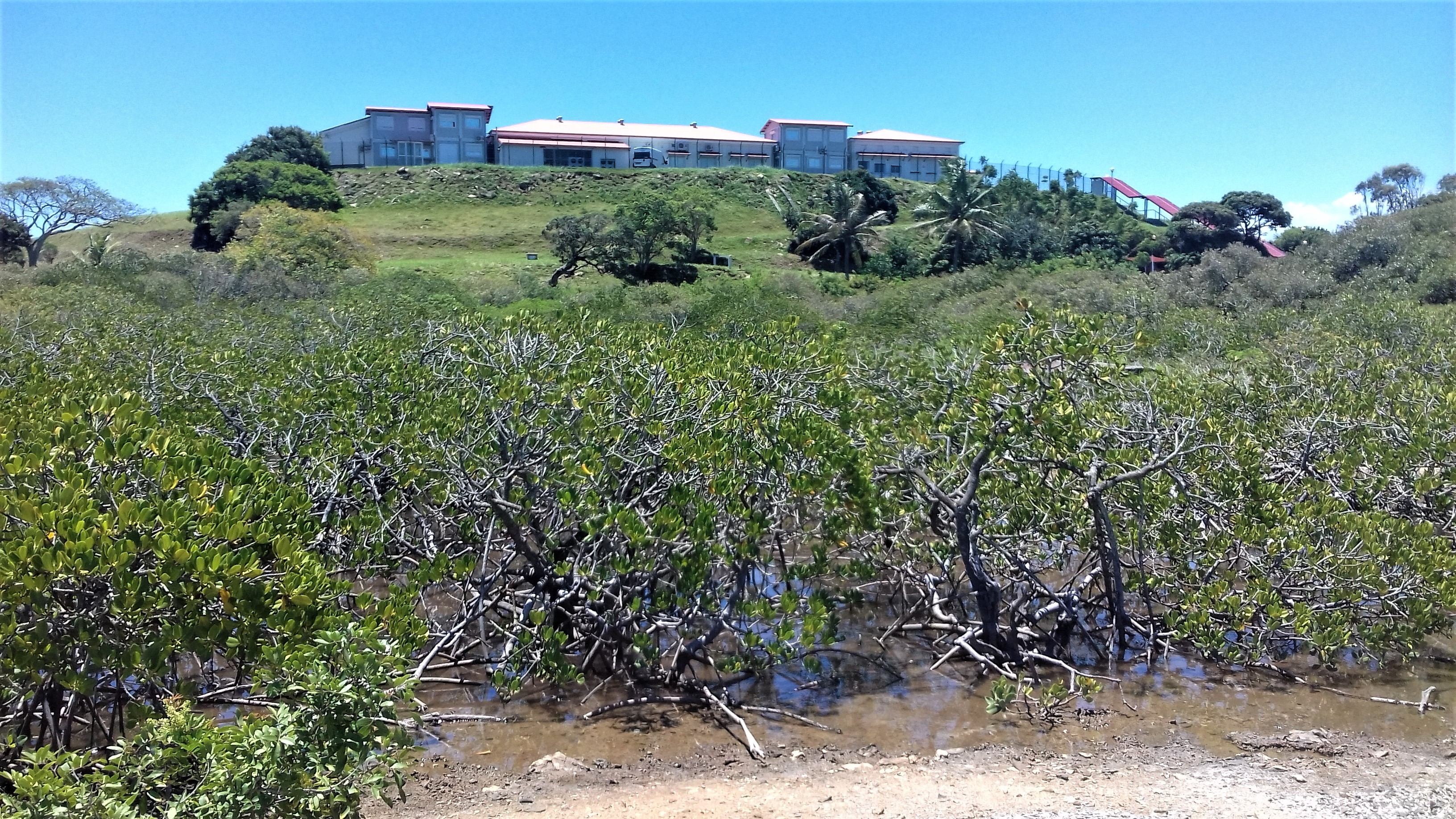 La Direction des Technologies et des Services de l'Information (DTSI) à Ouémo, Nouméa. Le site est environné de mangroves.